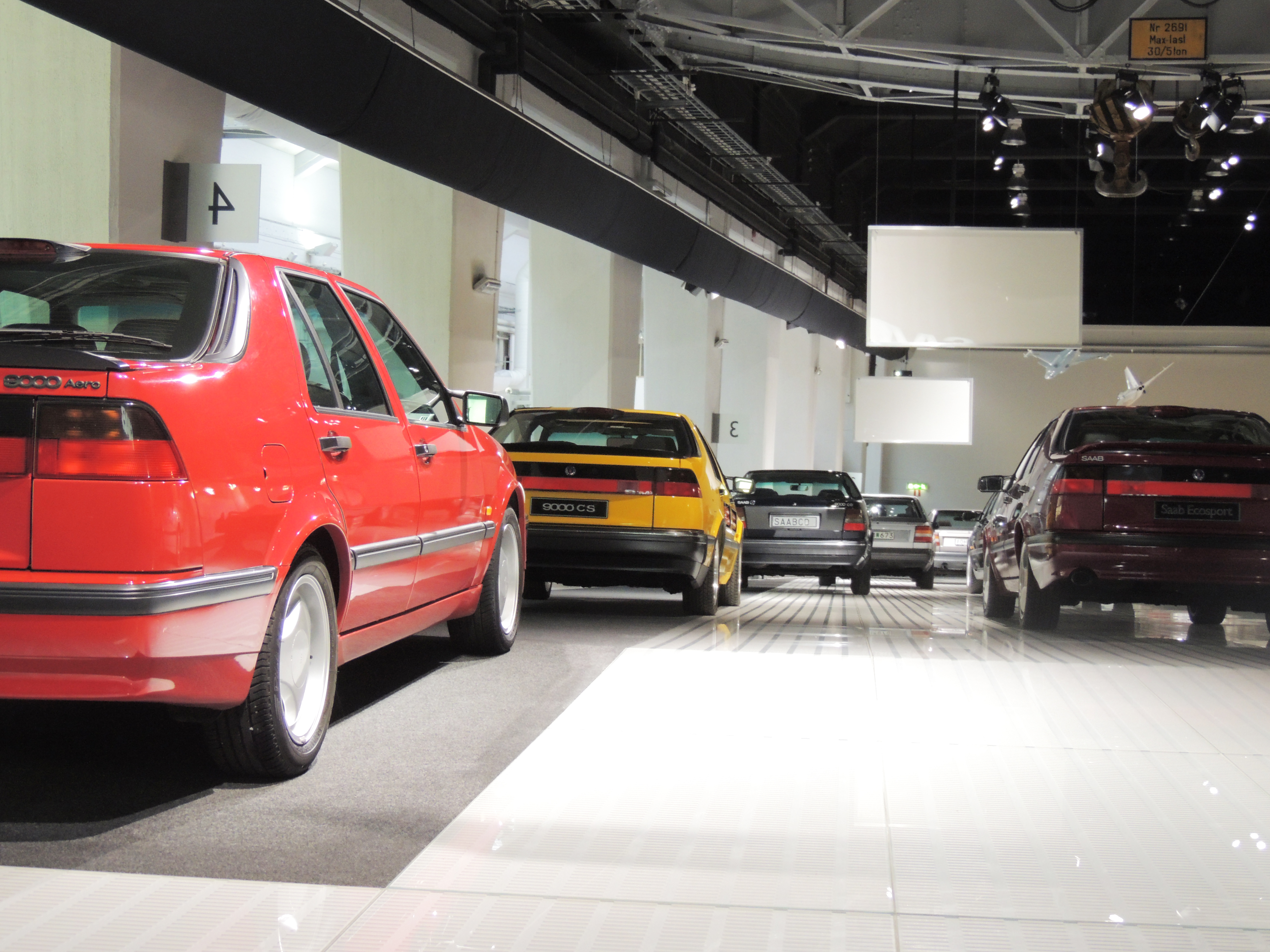 Tył 9000 w Muzeum Saaba